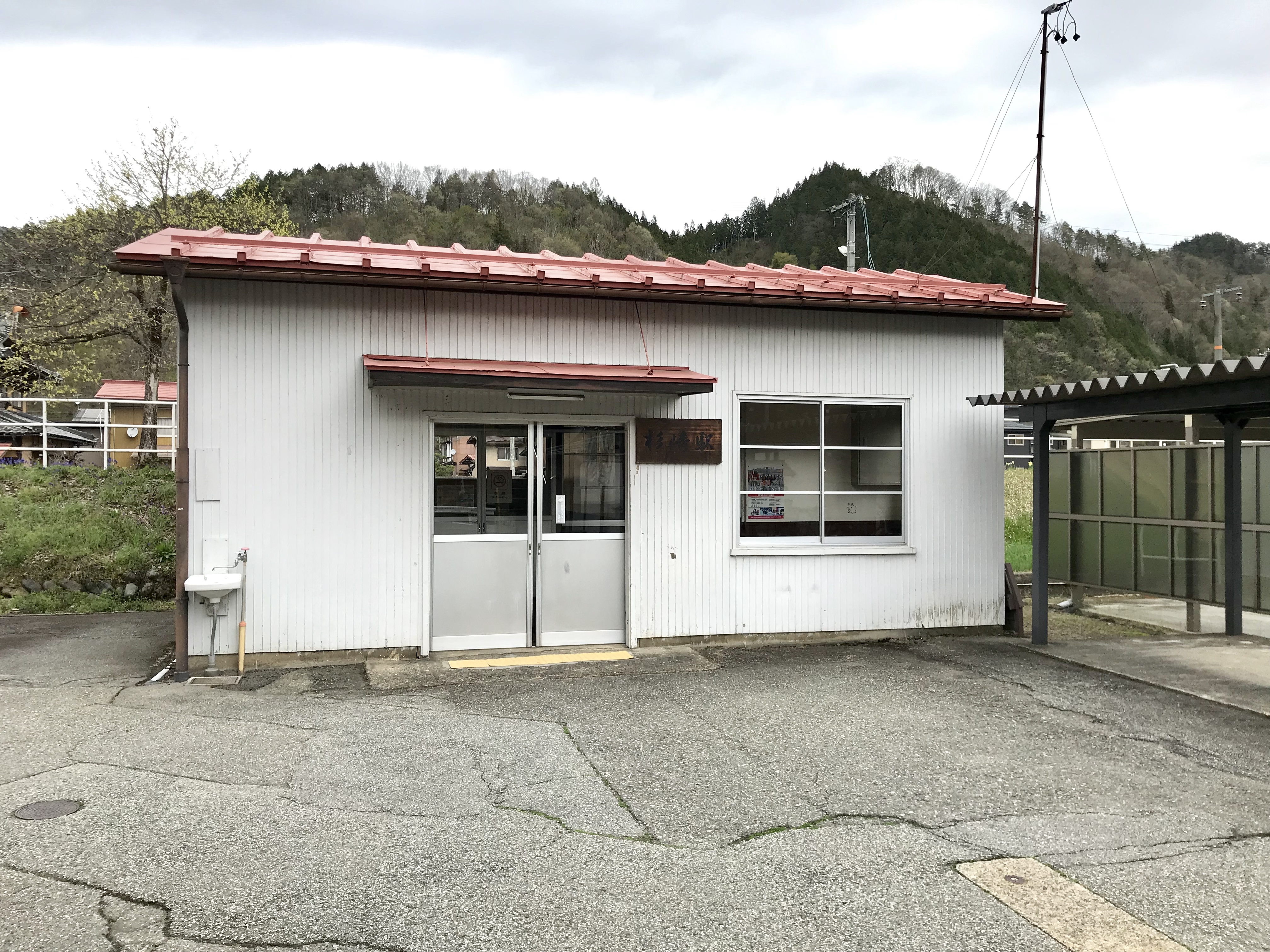 JR東海杉崎駅駅舎